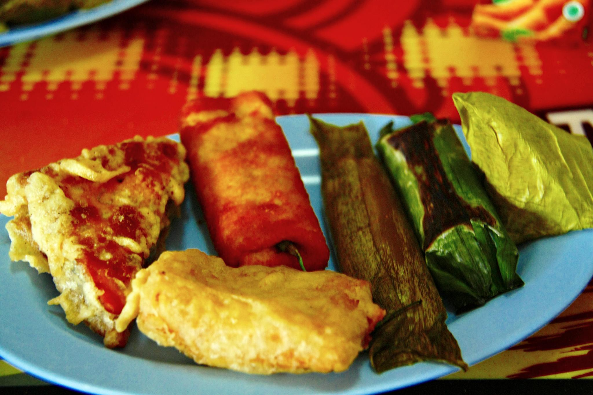 @ Sultan Iskandarmuda Int'l Airport, Aceh